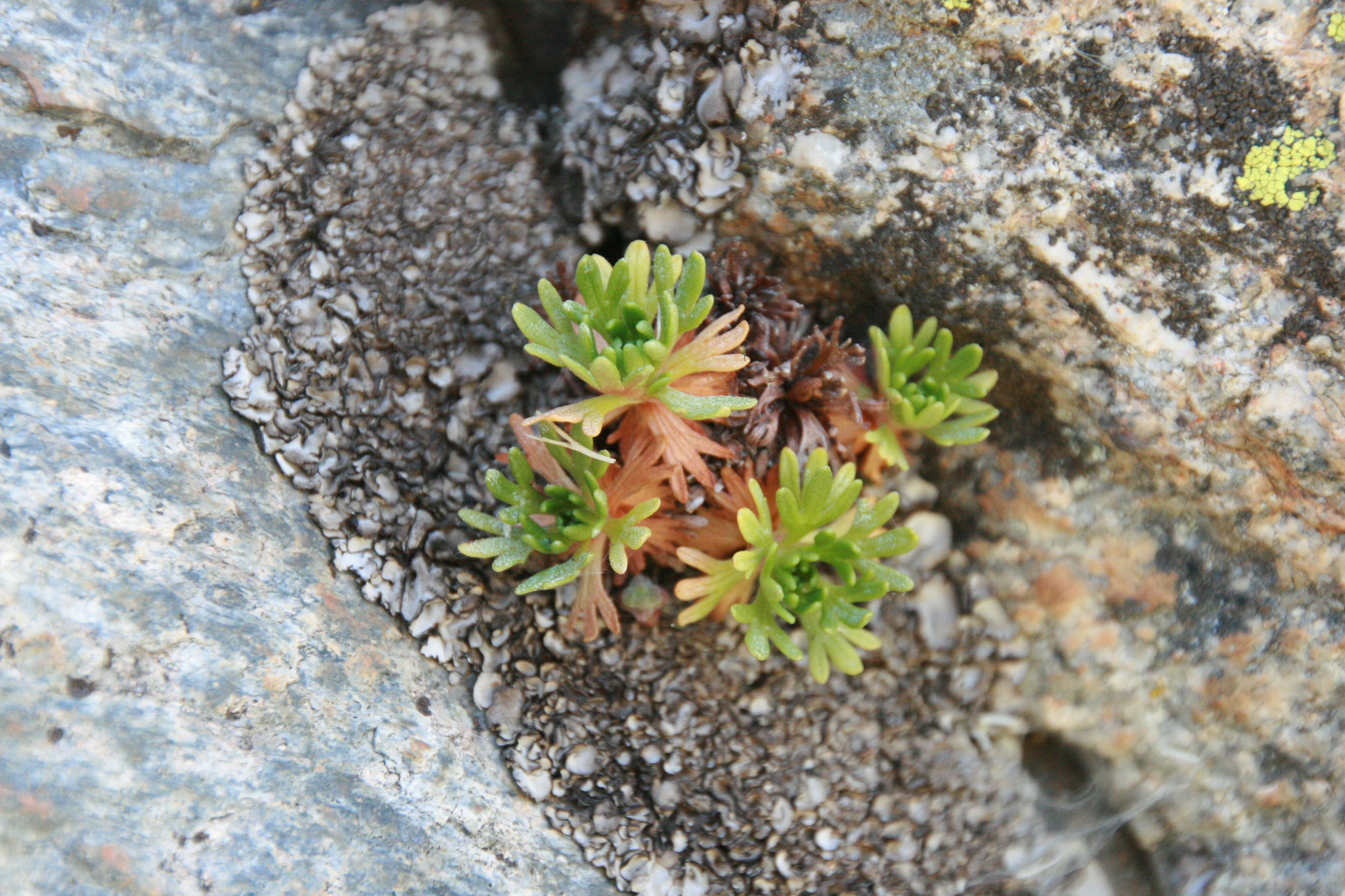 Flora en las inmediaciones de la Laguna Grande del Circo de Gredos en la Sierra de Gredos. Saxifraga pentadactylis subsp. almanzorii, España.